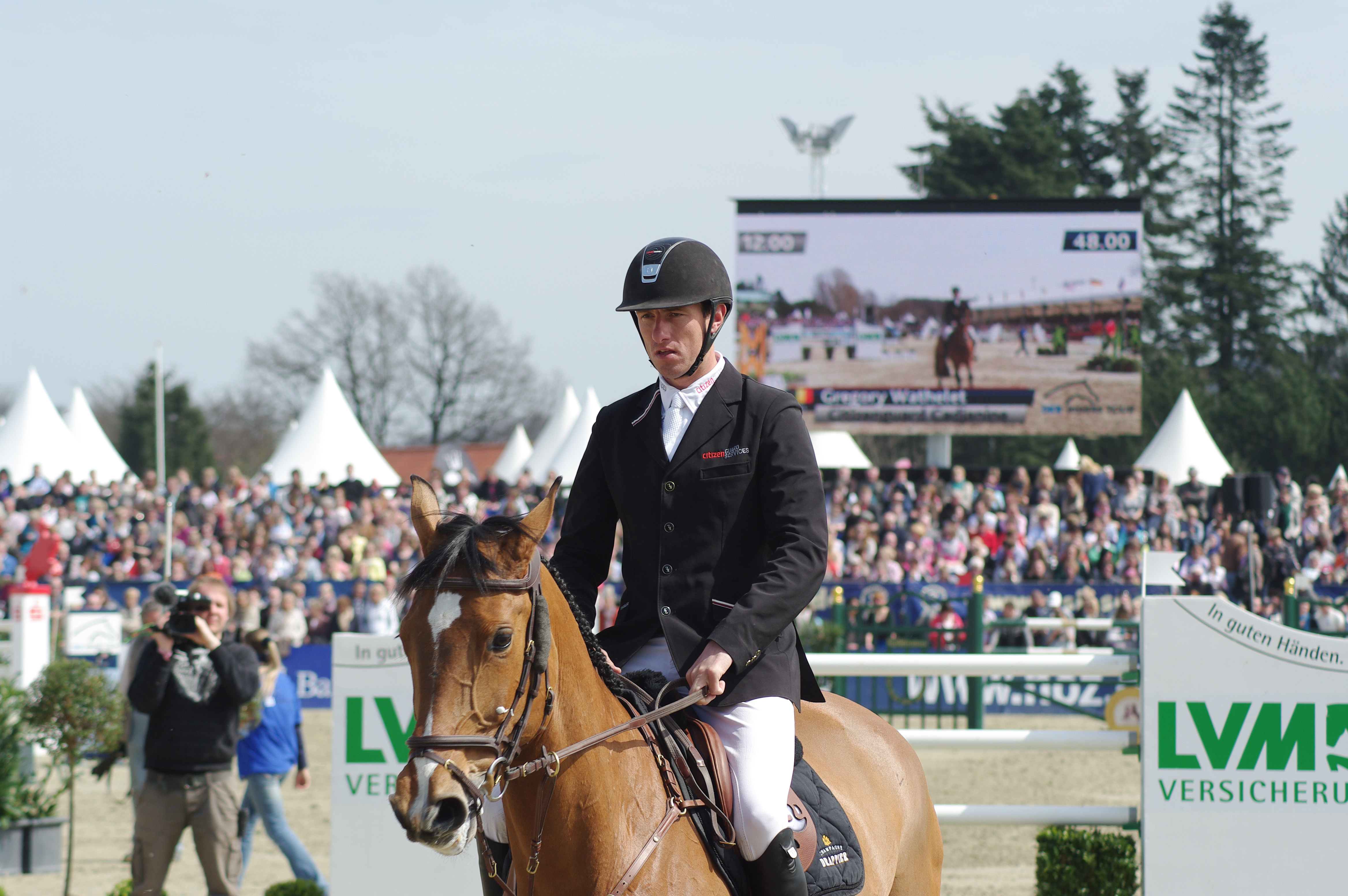 Horses & Dreams 2013: Gregory Wathelet mit Citizenguard Cadjanine